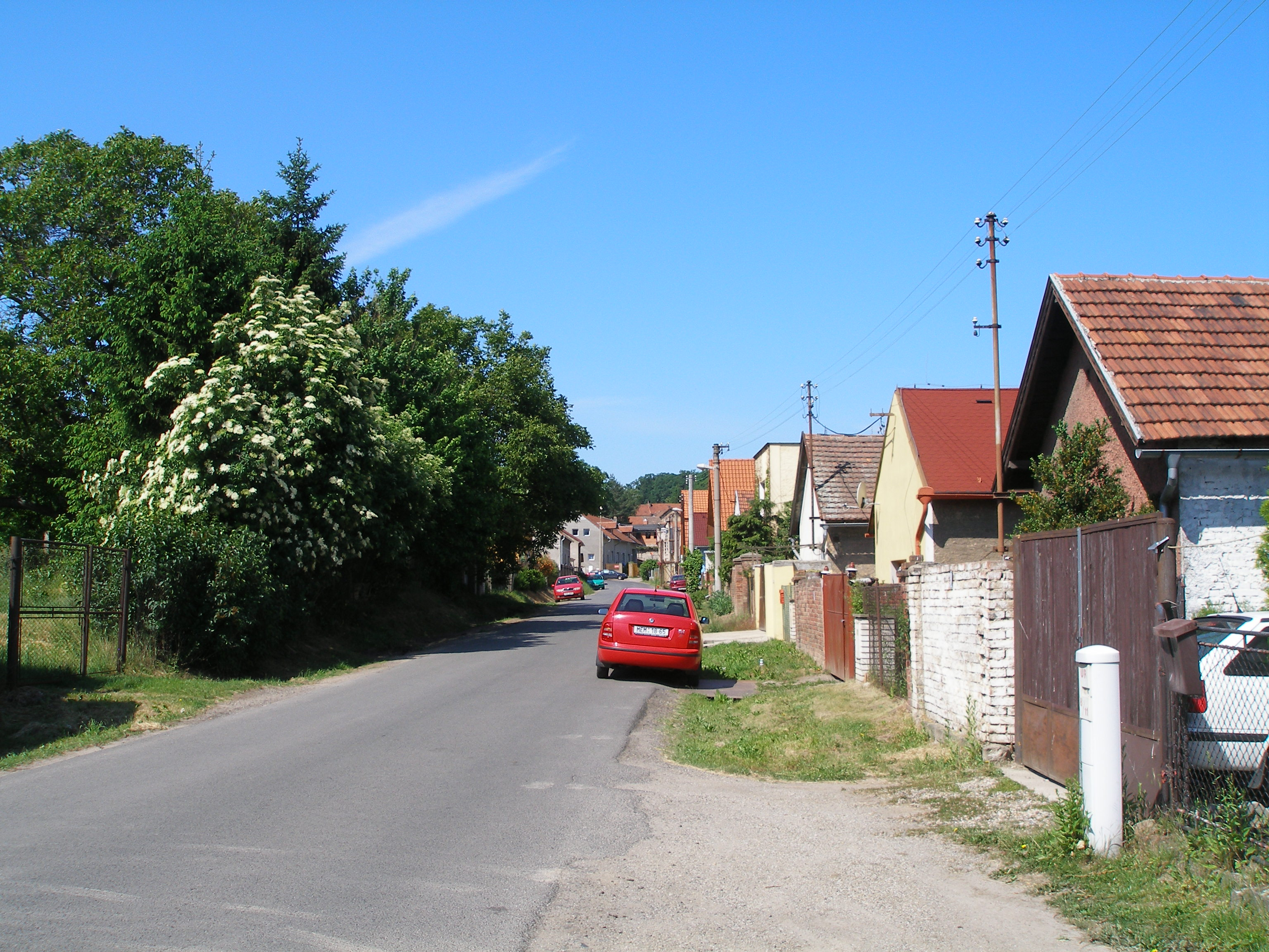 Ulice V Úvoze v Lešanech.